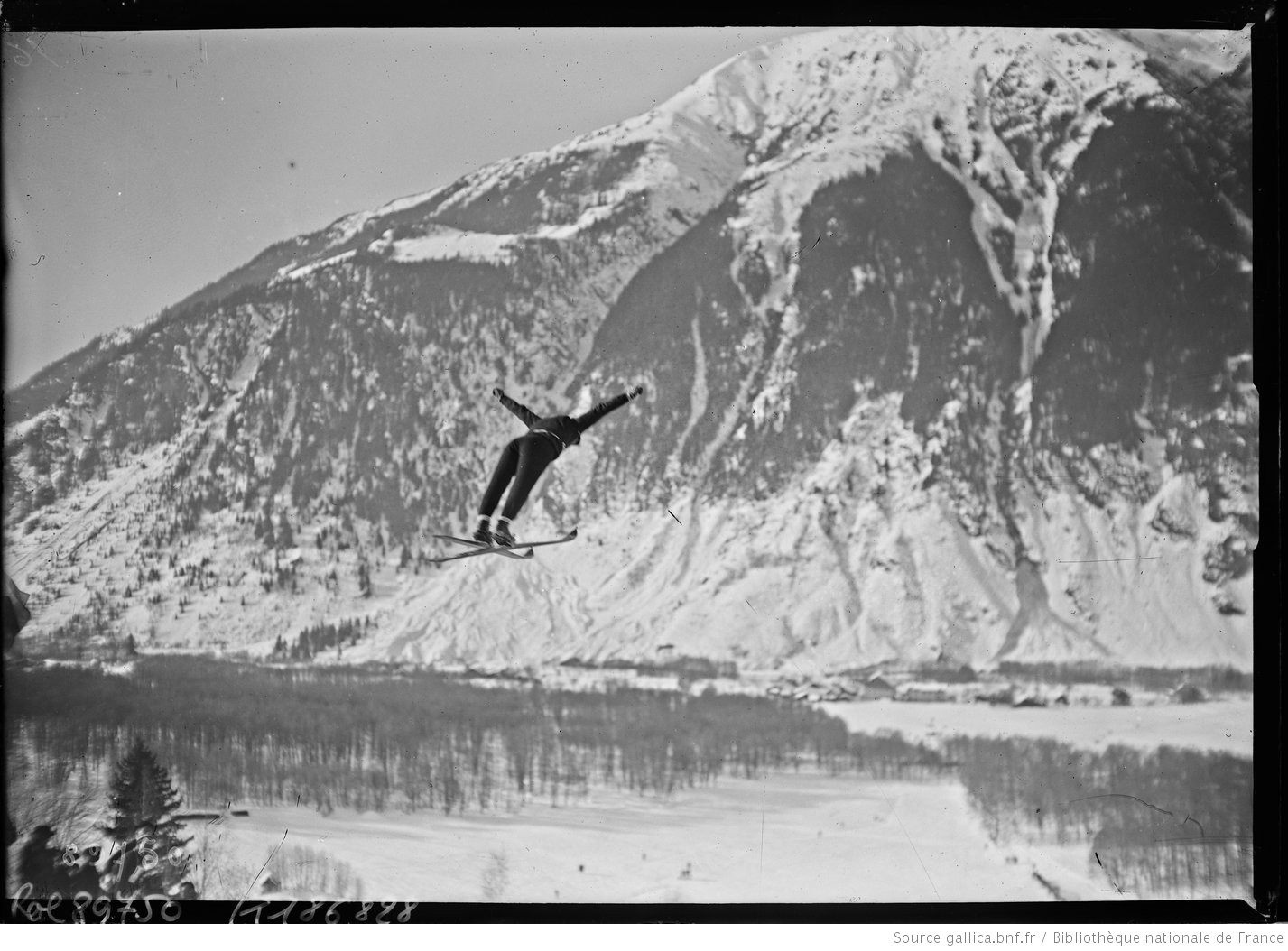 Chamonix, 4/2/24, Bonna (Norvège) [2e du saut à ski] : [photographie de presse] / [Agence Rol]